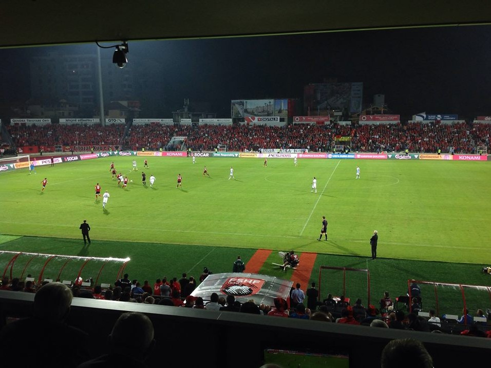 Elbasan Arena Stadium